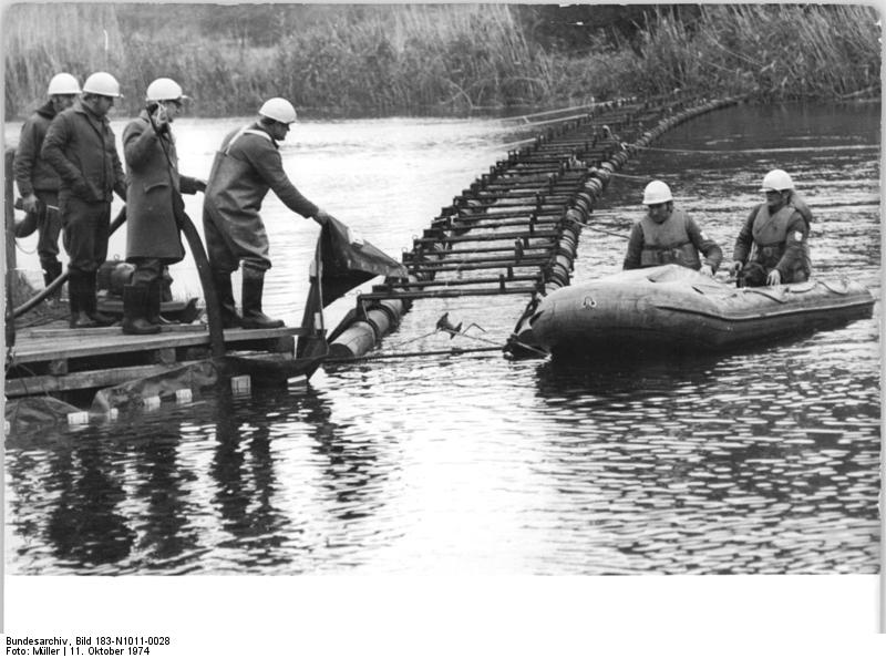 Kossenblatt, Lehrvorführung der Bekämpfung von Ölhavarien ADN-ZB Müller-11.10.1974 Bez.Frankfurt-O.:Lehrvorführung der Bekämpfung von Ölhavarien-Moderne Geräte zum schnellen und wirksamen Bekämpfen von Ölhavarien wurden am 11.10.1974 bei Kossenblatt, Kreis Beeskow, vorgestellt.Bereits ein Liter Mineralöl macht mehrere Millionen Liter Wasser unbrauchbar.Gezeigt wurden unter anderem schwimmende Ölsperren zum Aufhalten bzw.Abfangen des Ölfilmes.Die Geräte reichten von der flexiblen Ölsperre zum Sichern von Uferstrecken und Wasserentnahmestellen bis zu Netzsperren zum Rückhalten von neuen Ölbindemitteln.(weitere siehe ADN-Meldung)